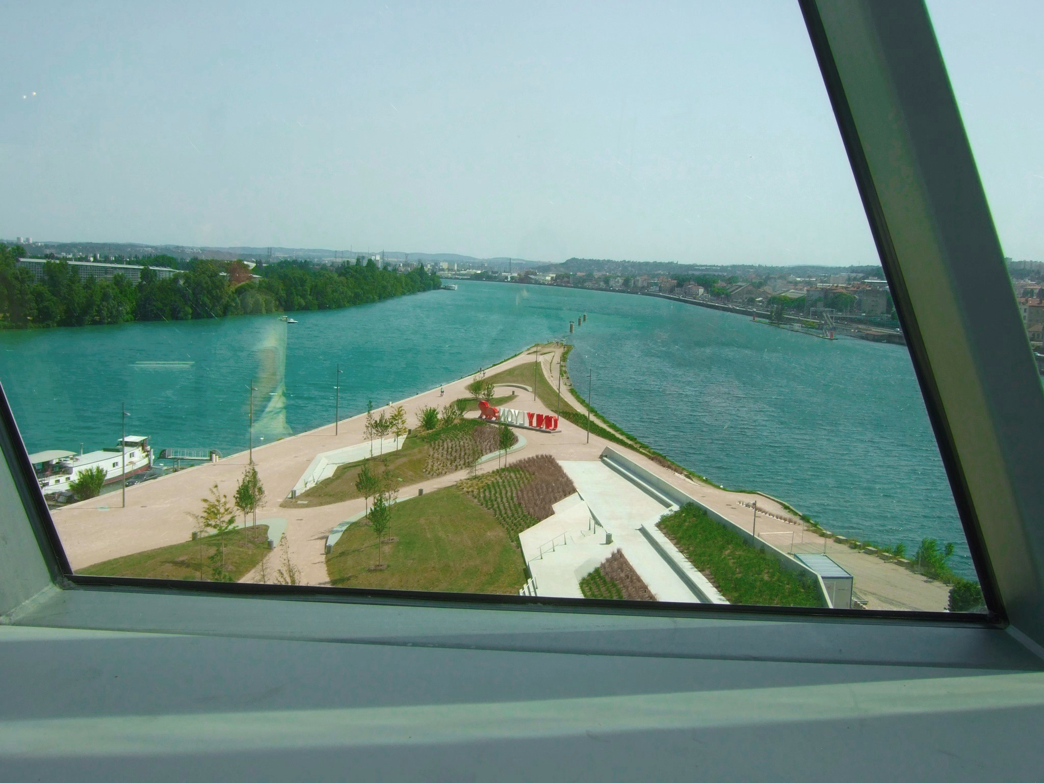 vue presque ile